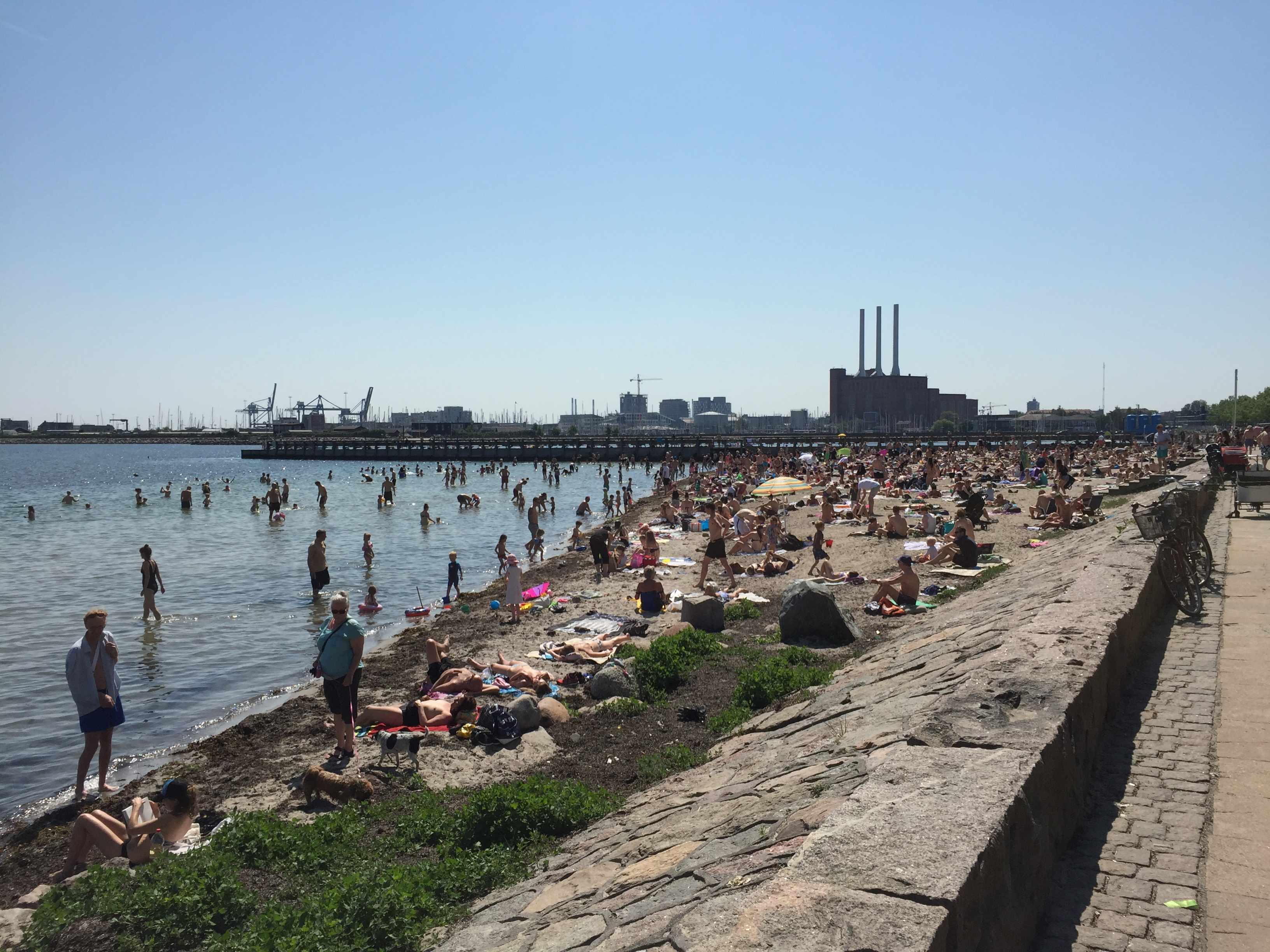 Svanemølle Beach in Copenahgen, Denmark